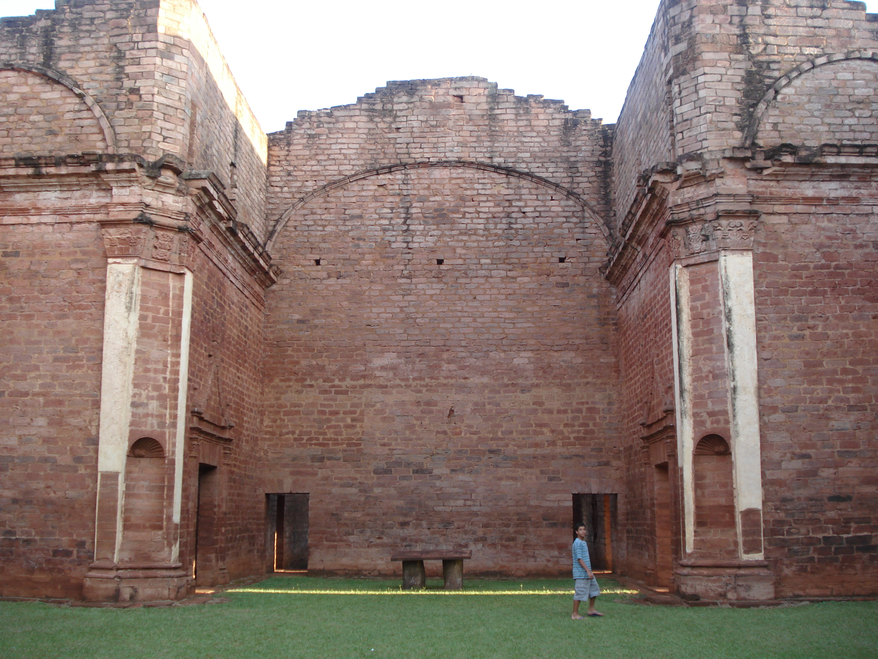 Ruinas de Jesús. Altar Mayor